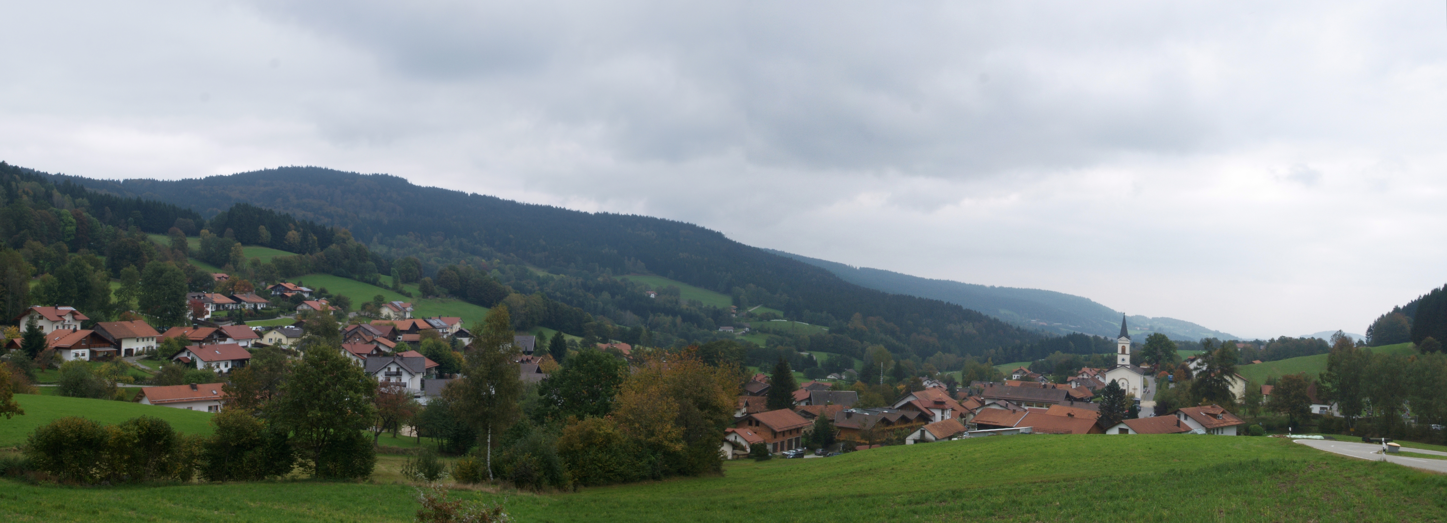 Elisabethszell; im Hintergrund der Pfarrerberg (911m)